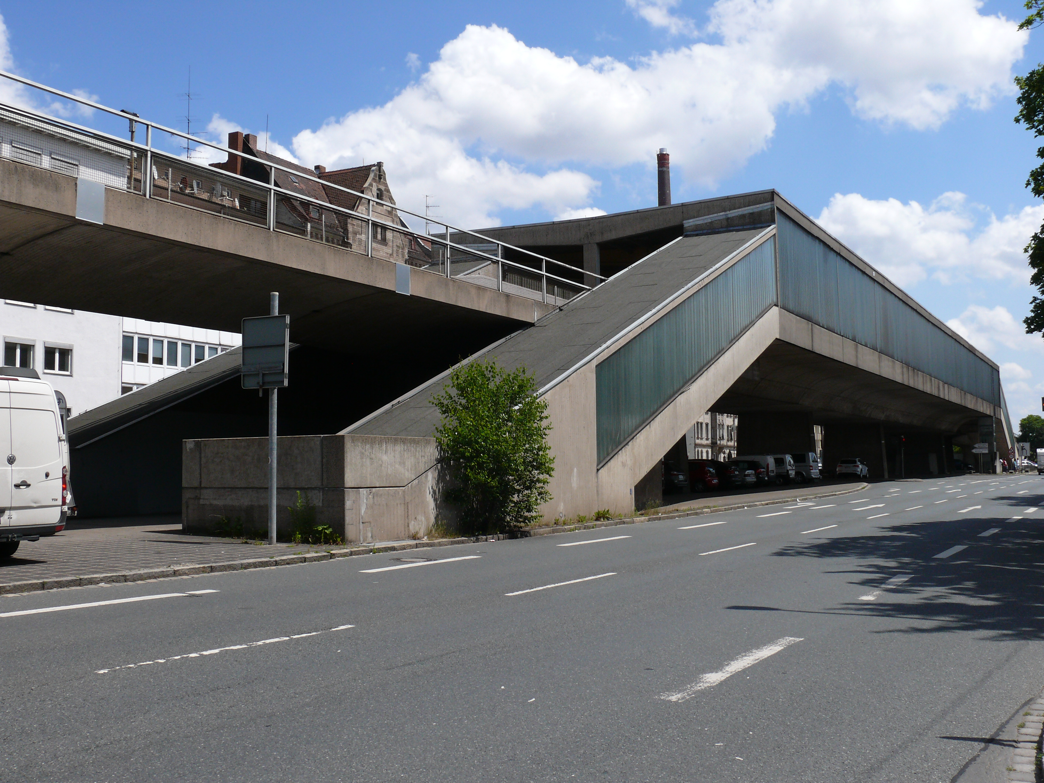 Der aufgeständerte U-Bahnhof Muggenhof in Nürnberg.